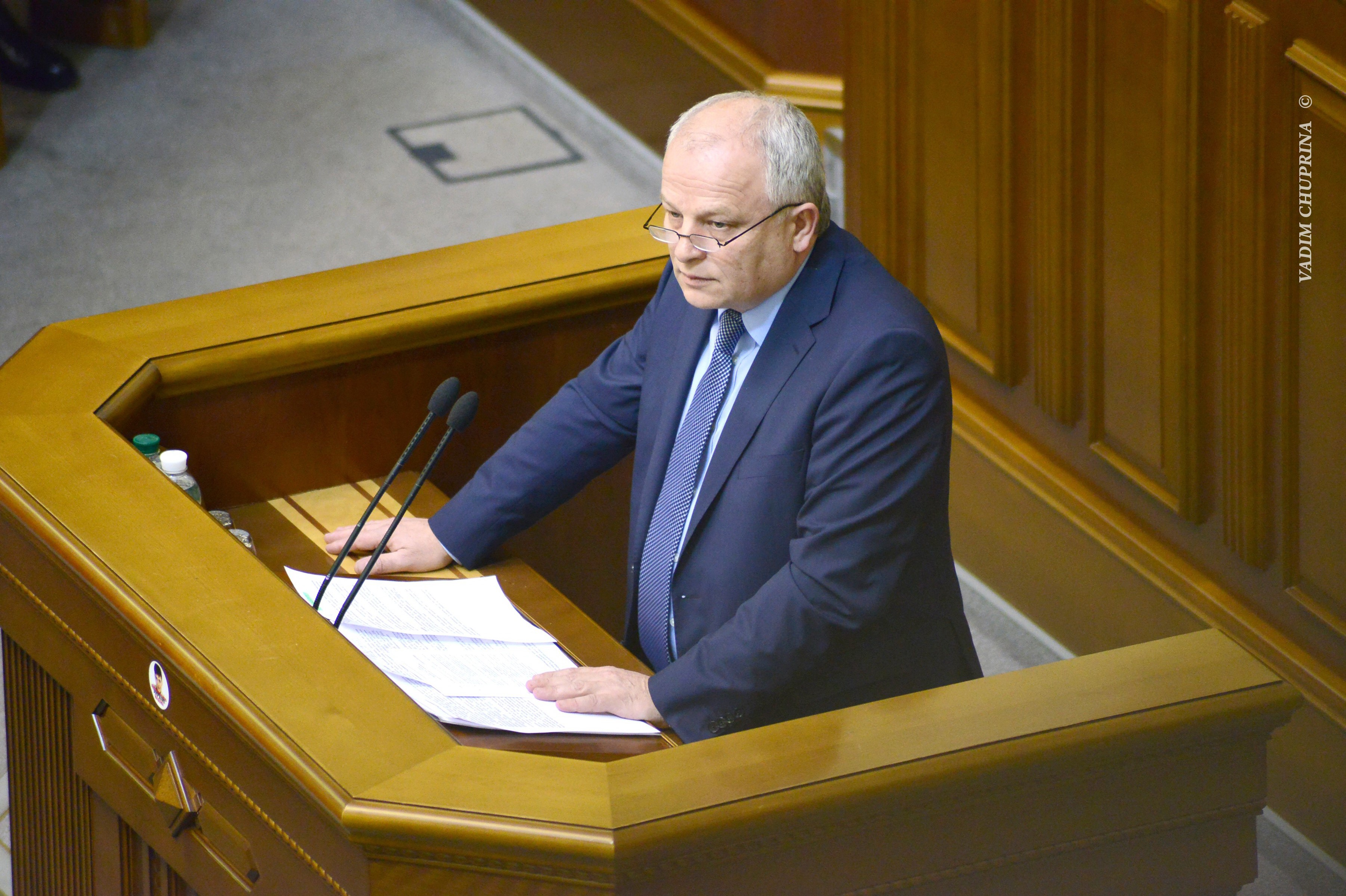 ВЕРХОВНА РАДА УКРАЇНИ 2015 фотограф Вадим Чуприна